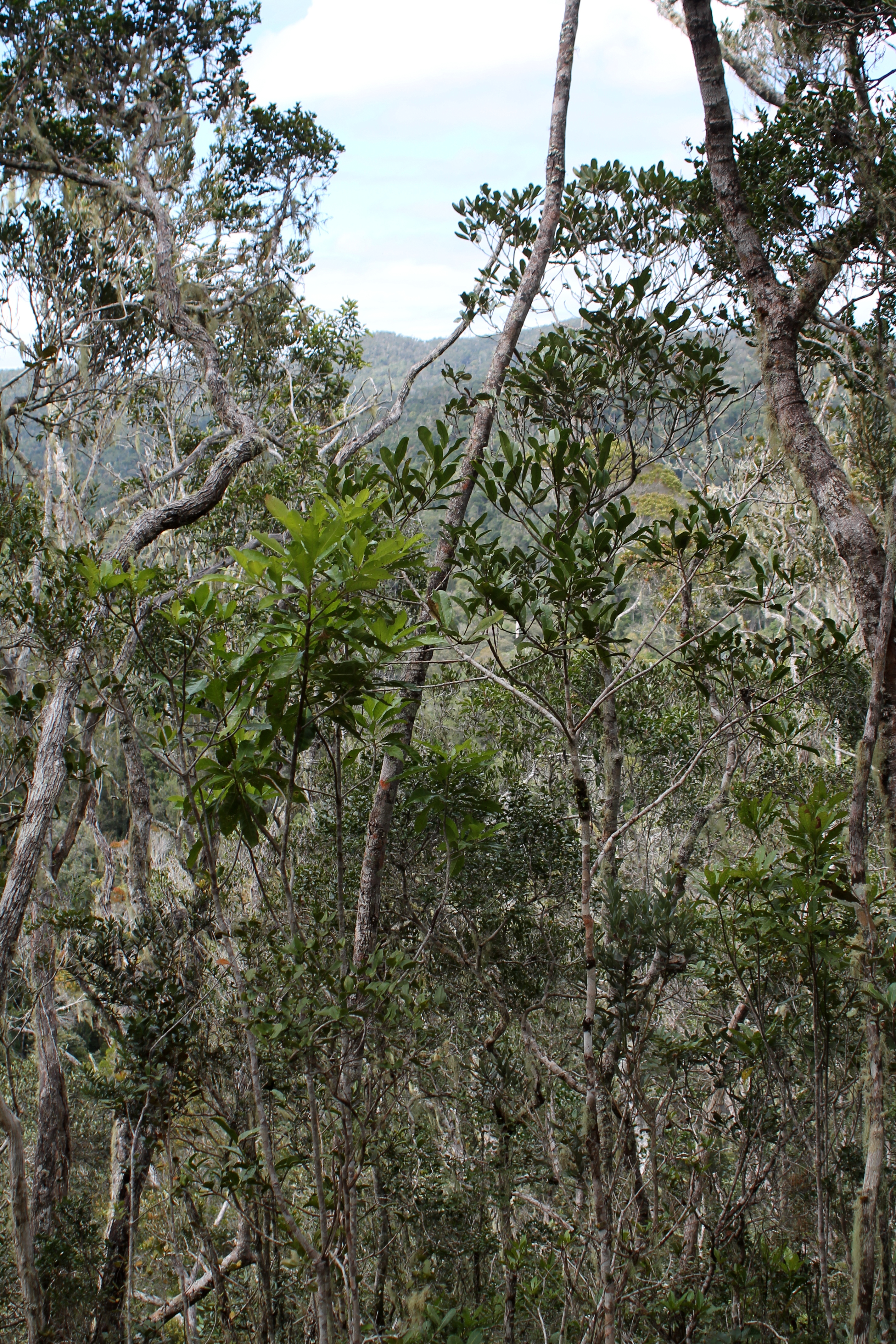 Nationaal park Mantadia